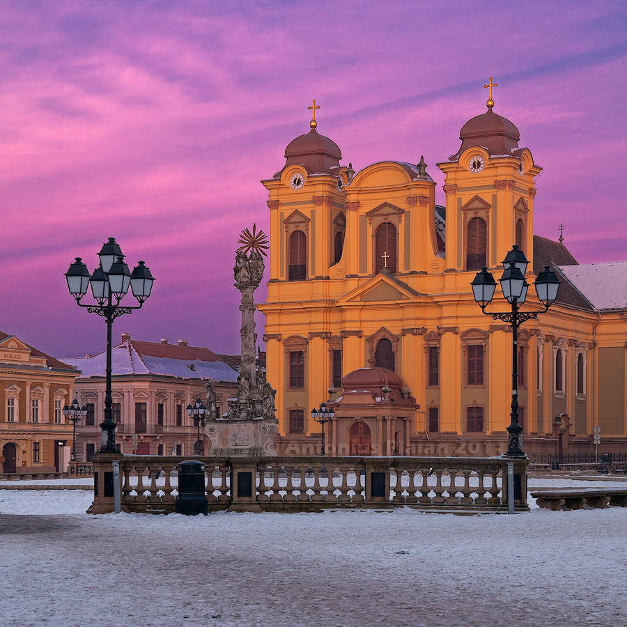 TIMISOARA - Domul si monumentul Sf. Treime